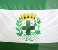 Bandeira do município de Magda.